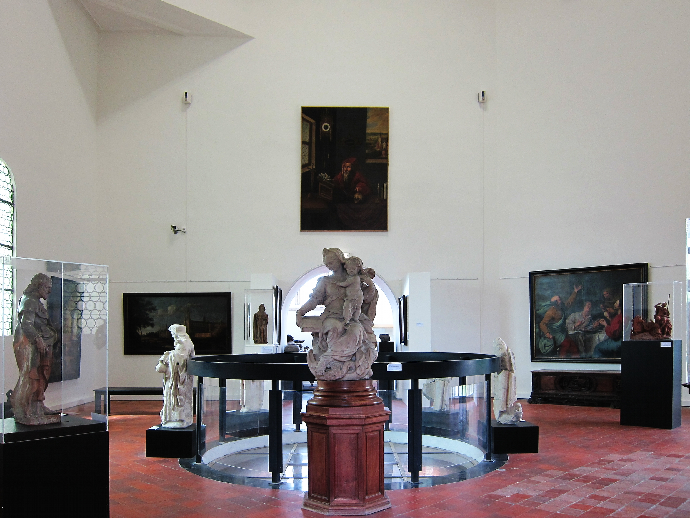 L'intérieur du musée municipal de la tour abbatiale de Saint-Amand-les-Eaux.